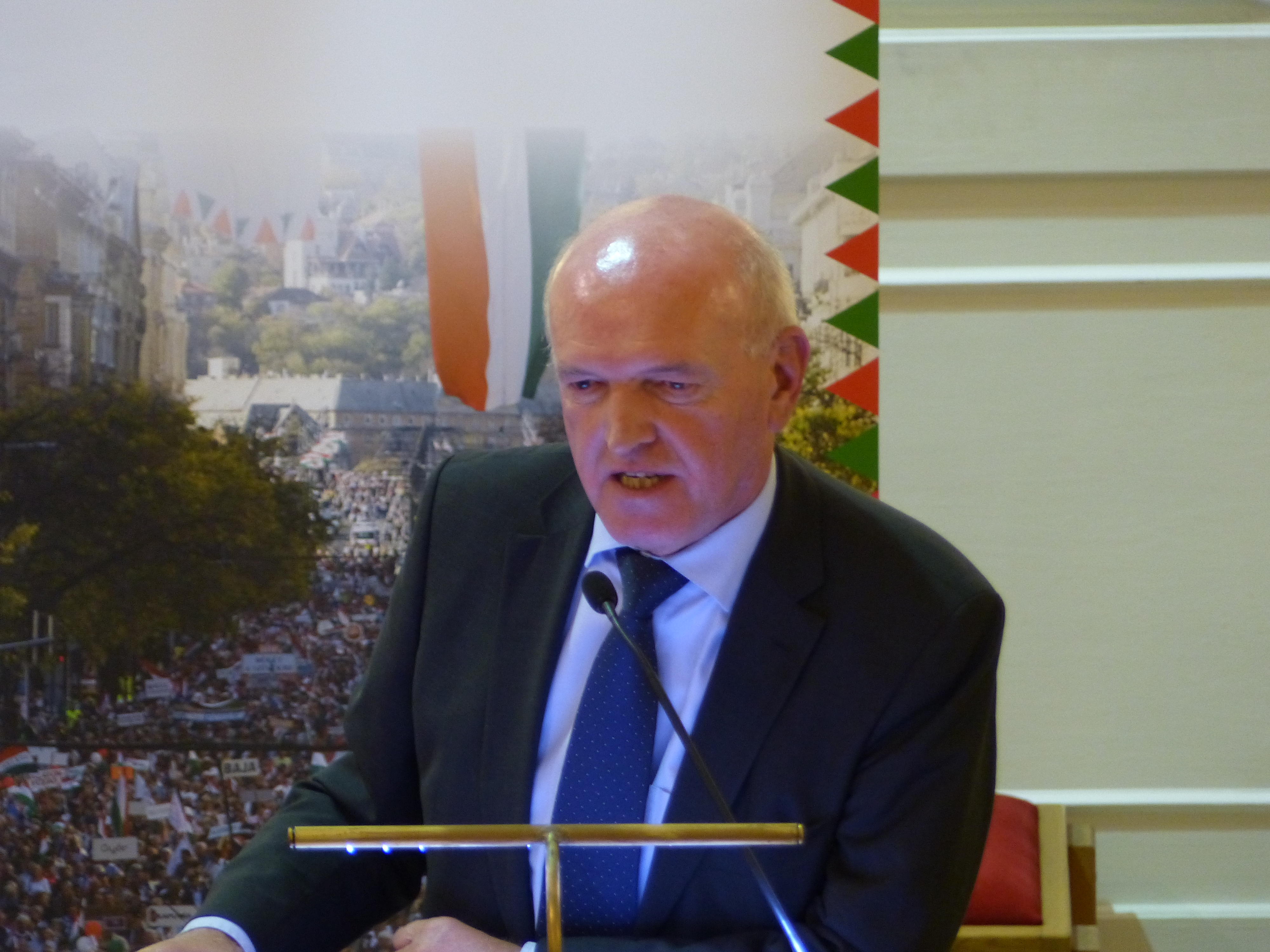 Thomas Habermann. a Szent Margit Gimnázium kápolnájában, Budapesten